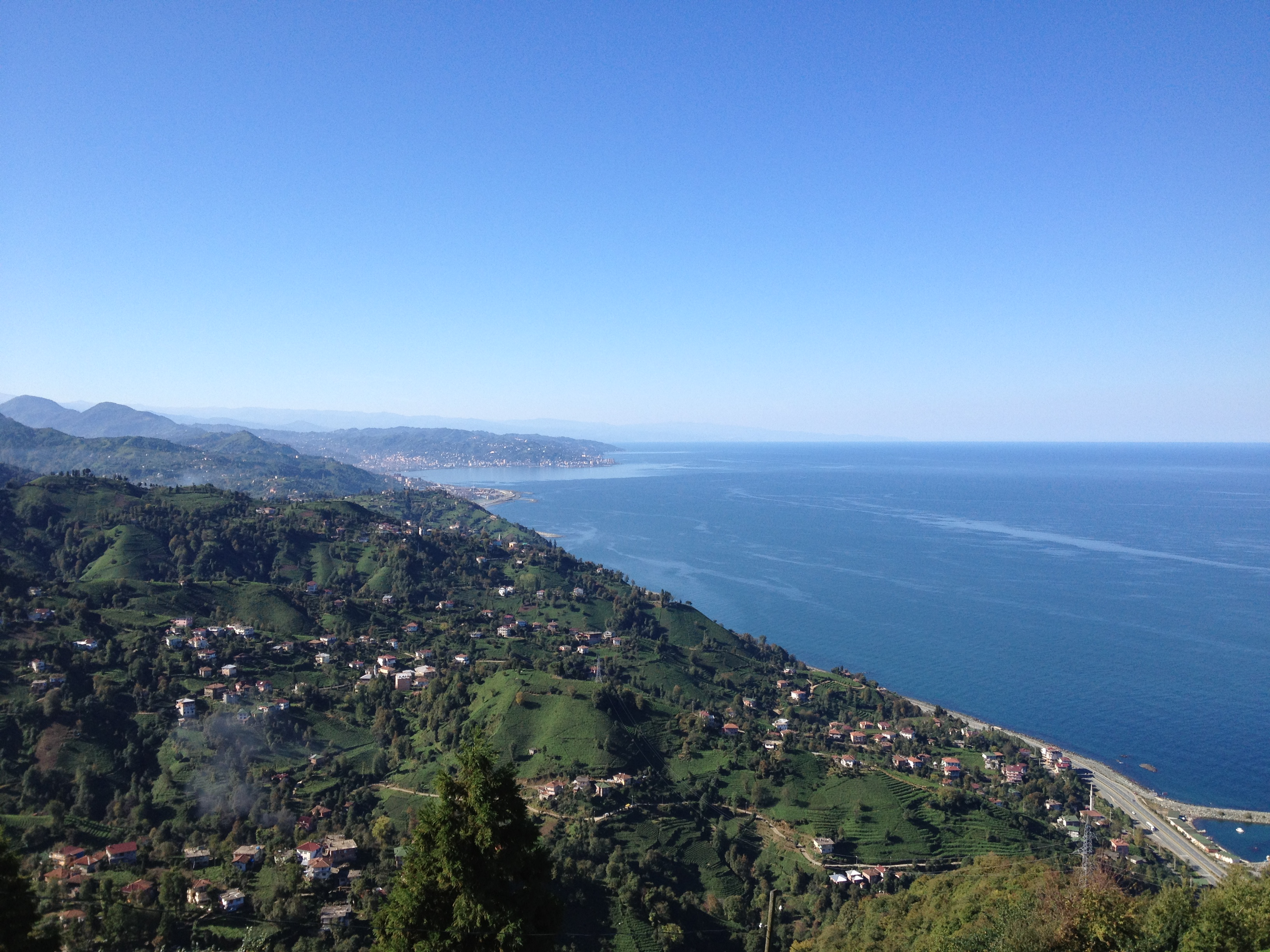 53800 Söğütlü/Rize Merkez/Rize, Turkey